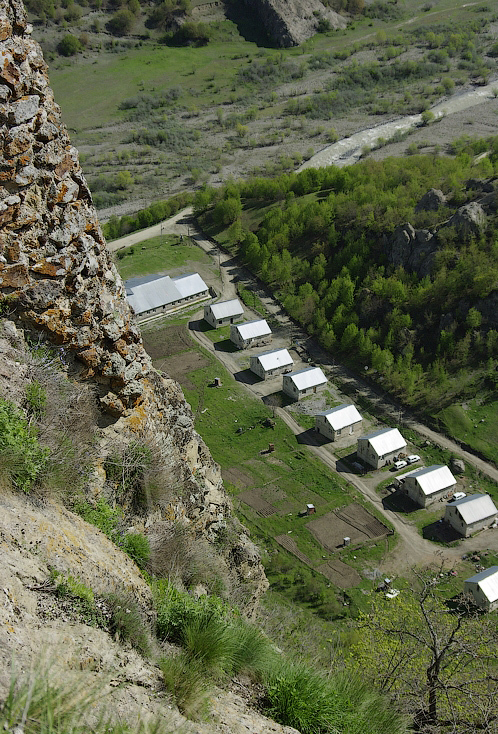 Кнараван